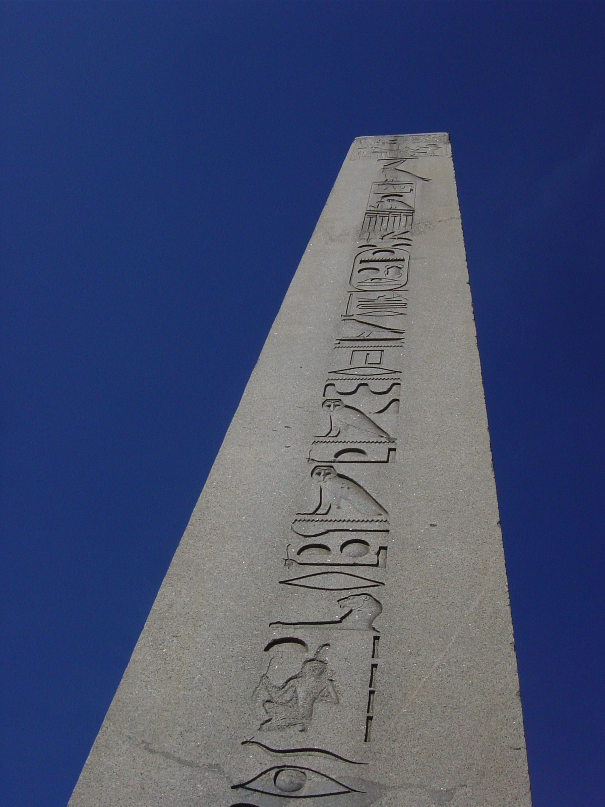 Istanbul: l'obelisco cosiddetto "di Teodosio" (in realtà antico egizio, eretto in origine da Tutmosi III) che fungeva da meta nell'immenso ippodromo costruito dagli imperatori romani e bizantini. Fu eretto nel 390 d.C., e l'impresa fu giudicata di tale rilievo che le fasi dell'erezione dell'immenso monolito sono illustrate nel piedistallo su cui è montato. Foto di: Giovanni Dall'Orto, 25-5-2006.